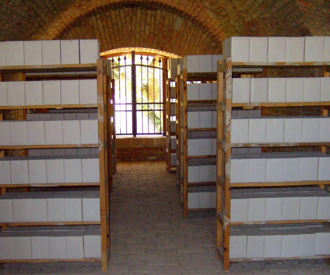 Kolumbarium des Theresienstädter Lagers im Mauerwerk der Befestigungsanlage Aufnahme: 1. Juli 2006 Url